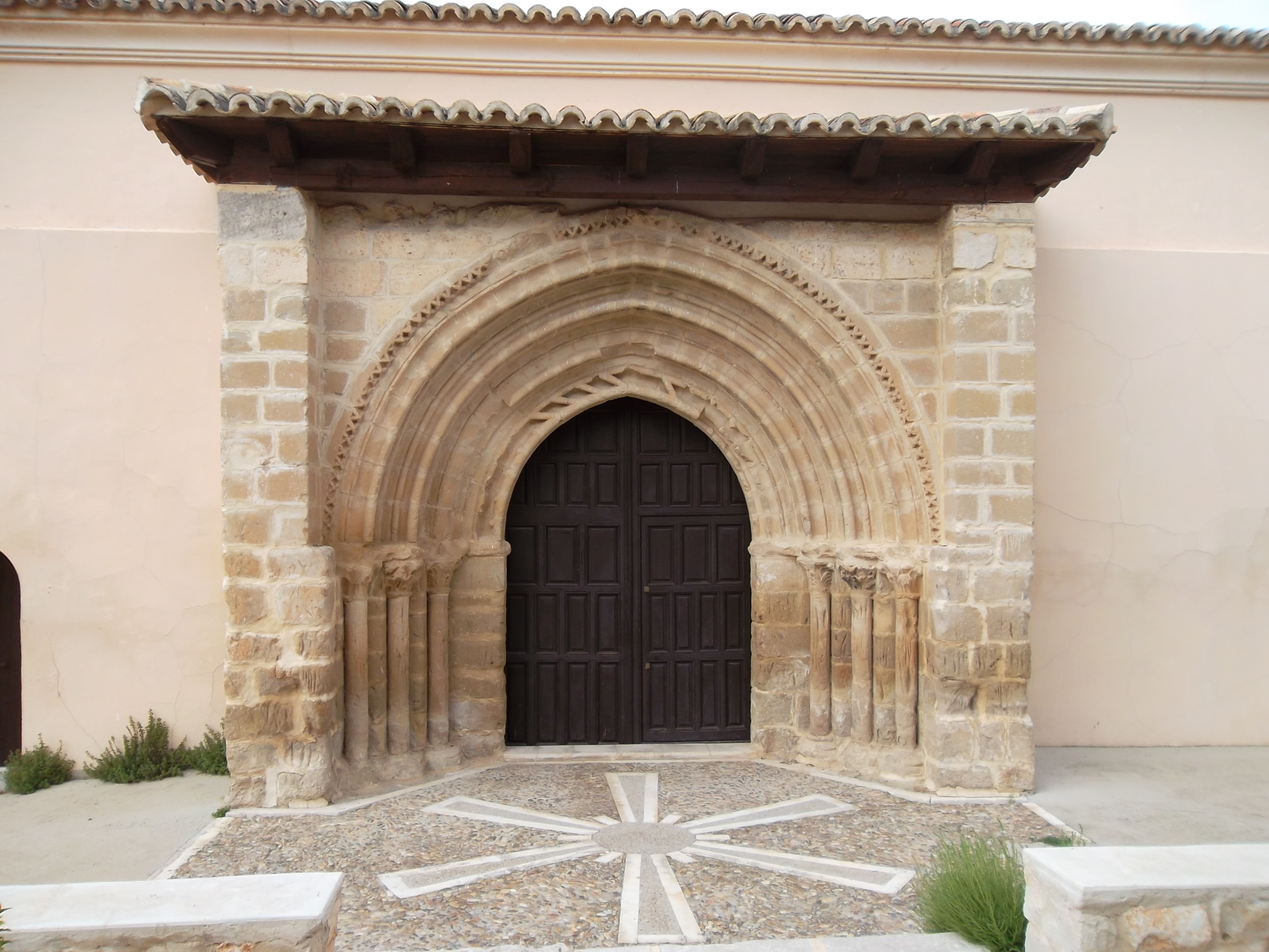 Escopete-Iglesia de la Asunción, de origen románico, fue destruida parcialmente durante la Guerra Civil.El pórtico es probablemente del siglo XIII.